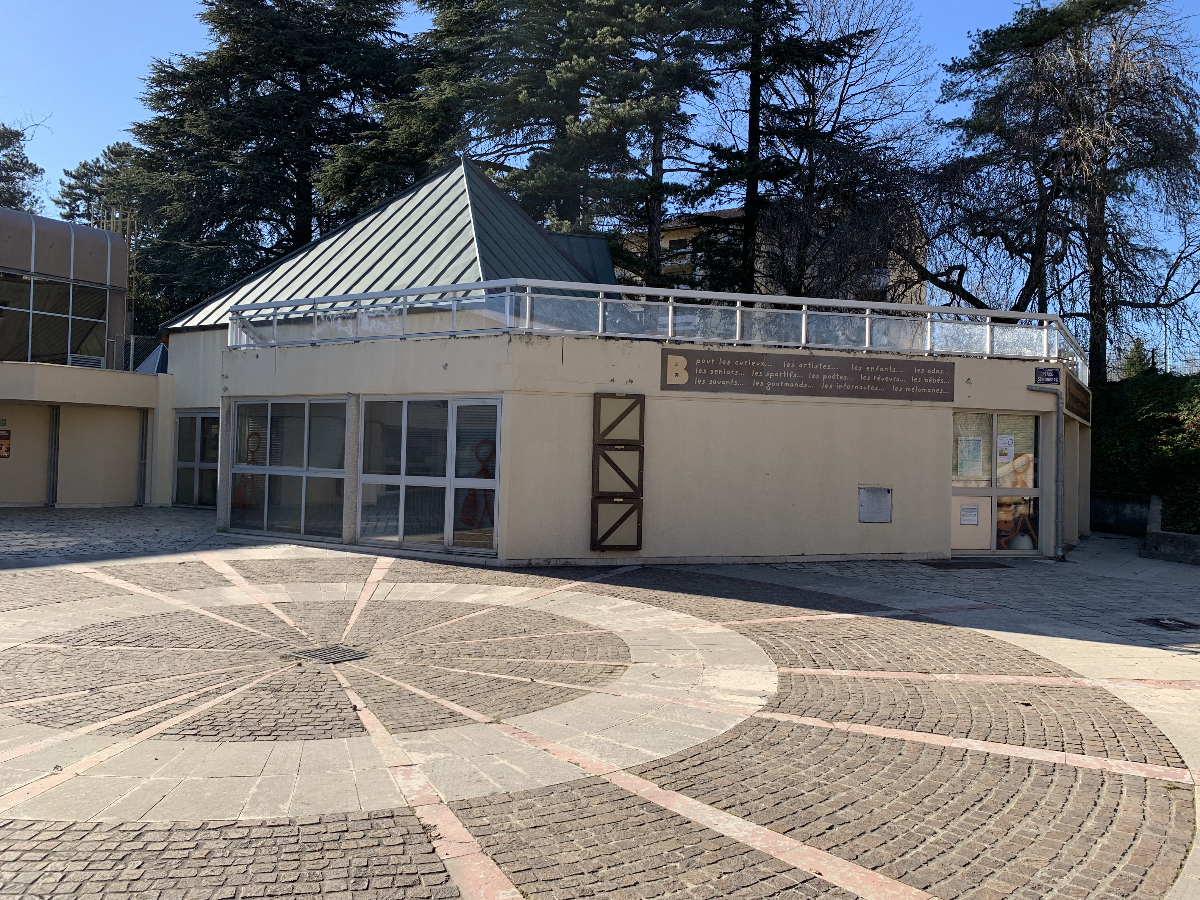 place Schönberg (Lyon).